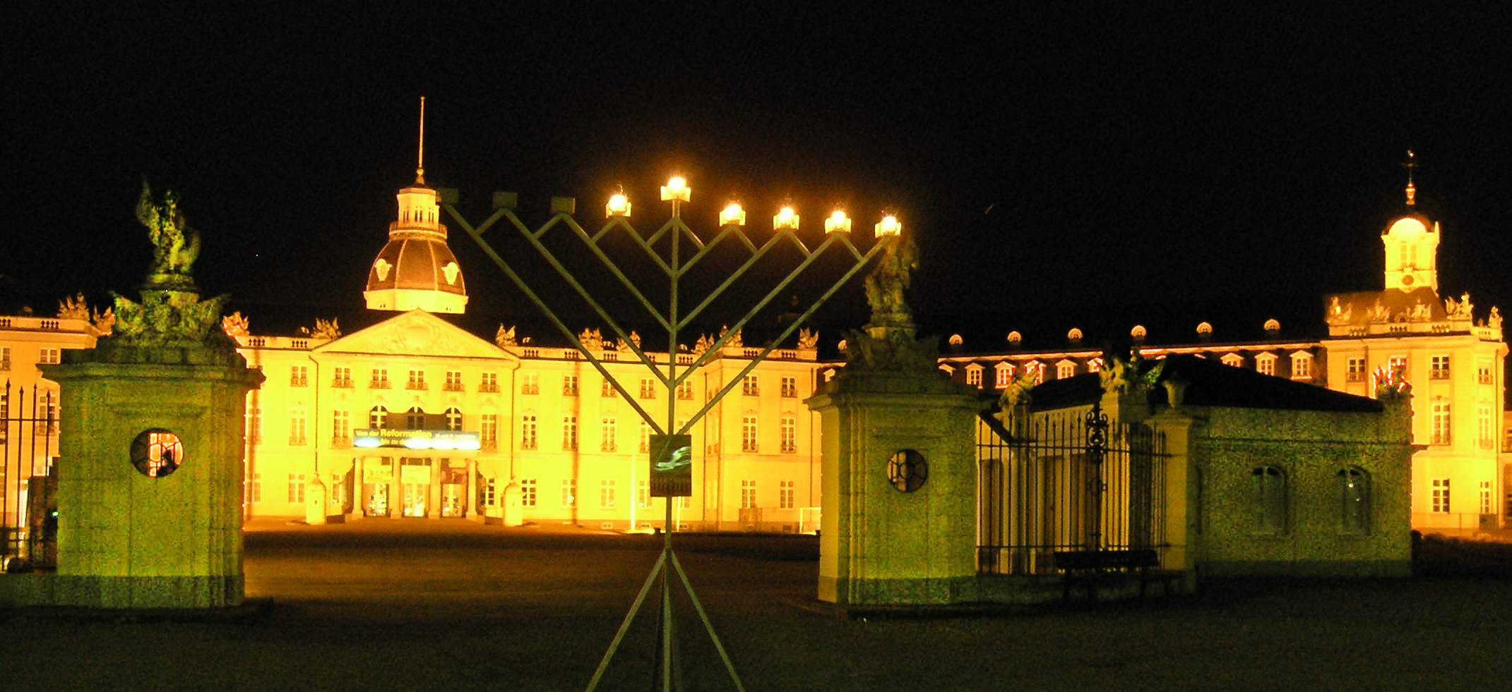 File:Chanukka Karlsruhe 3.jpg עם הבהרת התמונה